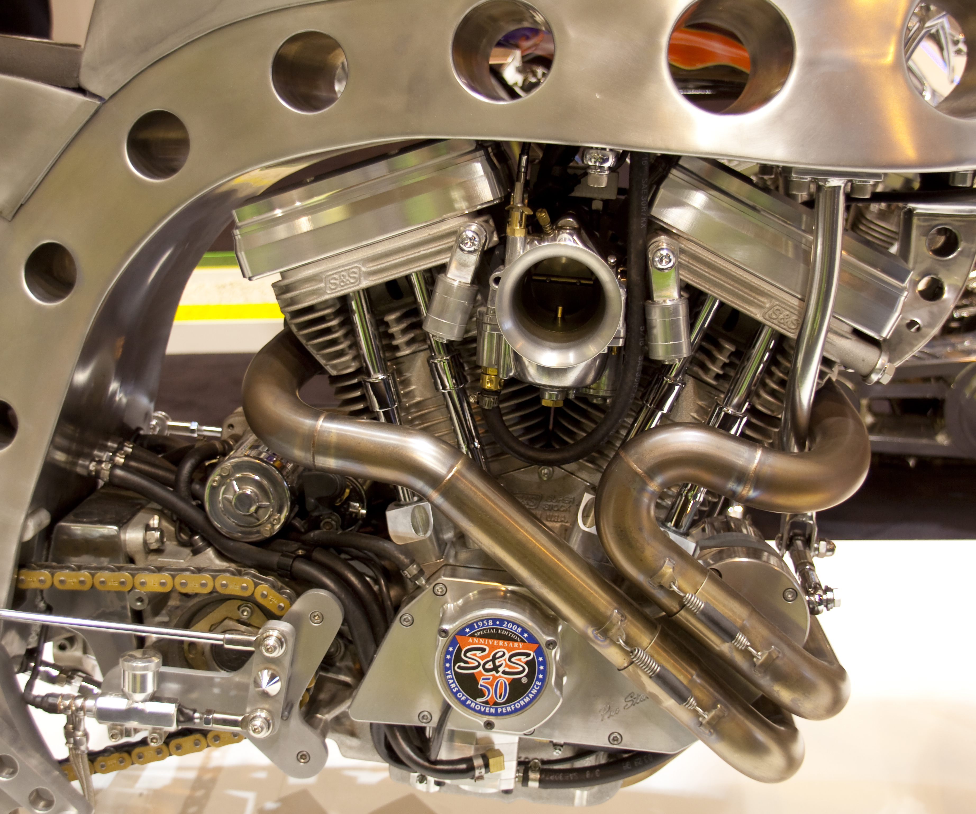 S&S engine